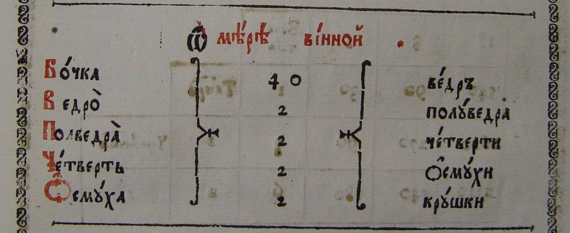 Хлебные меры по Арифметике Магницкого (Русская система мер)